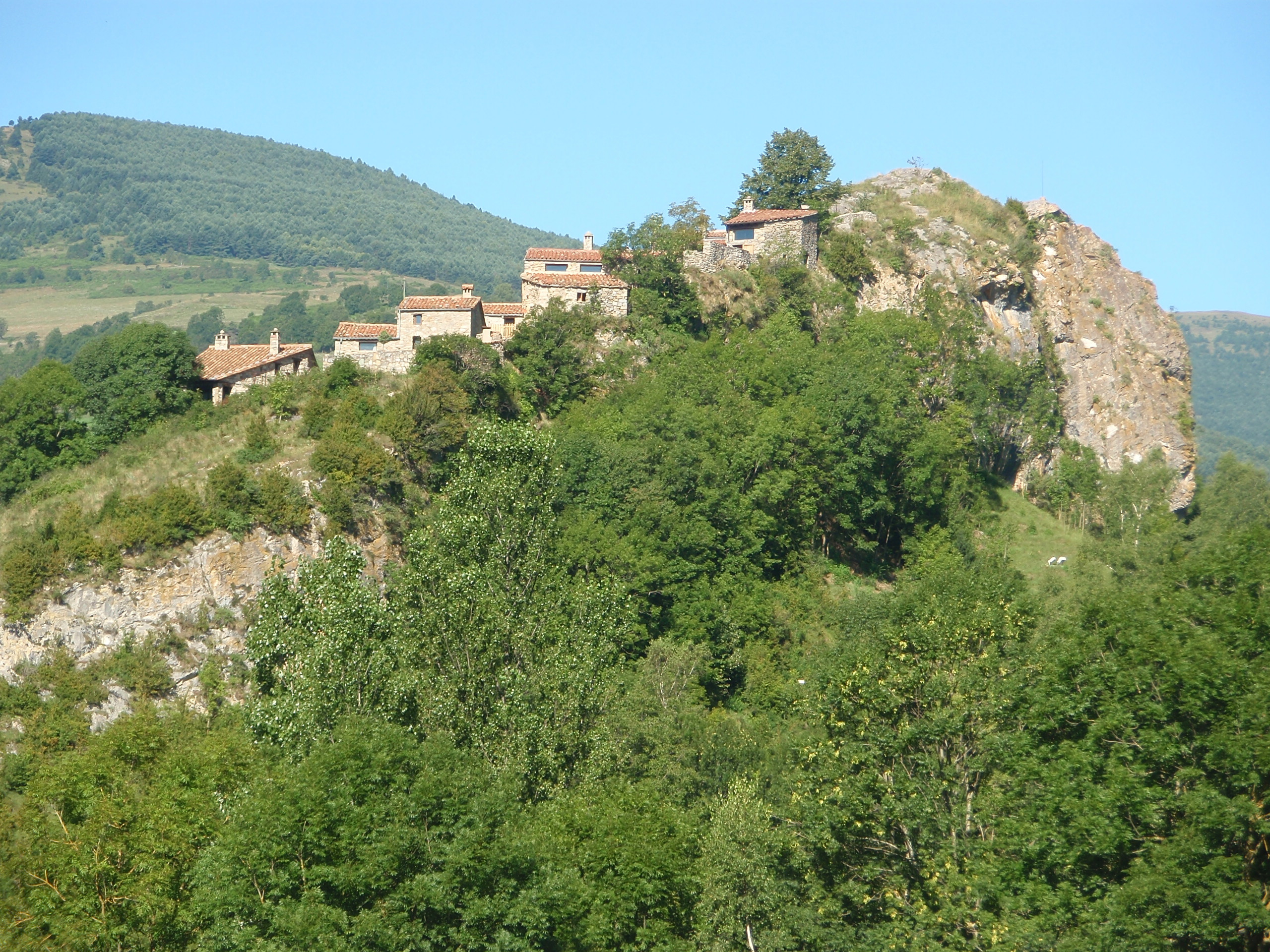 Roca de Pelancà vista des de Llanars